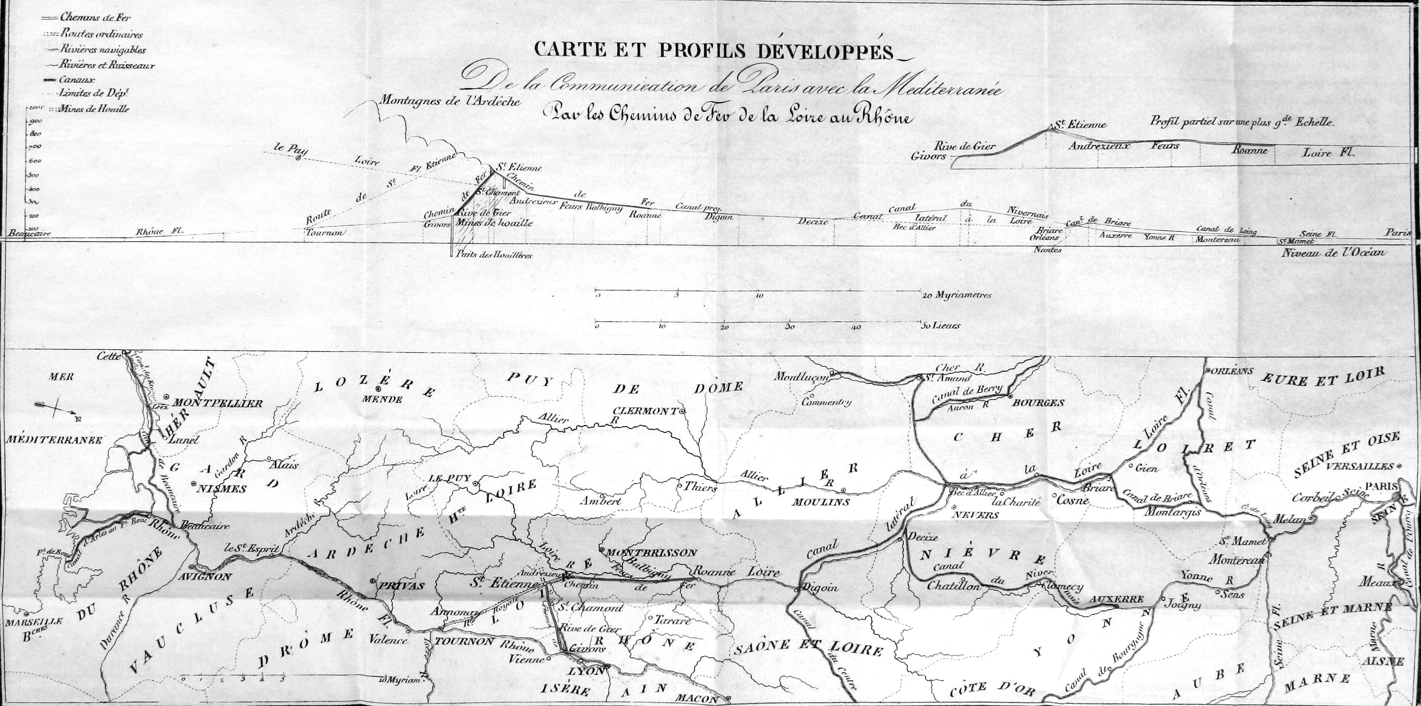 Auteur(s) : Mellet, François-Noël & Henry, Charles-Joseph Titre(s) : Mémoire sur le chemin de fer de la Loire, d'Andrezieux à Roanne, par MM. Mellet et Henry,... [Texte imprimé] Publication : Paris, impr. de Huzard-Courcier, 1828 Description matérielle : In-8°, XII-52 p., planche Notice n° : FRBNF30922903 BNF